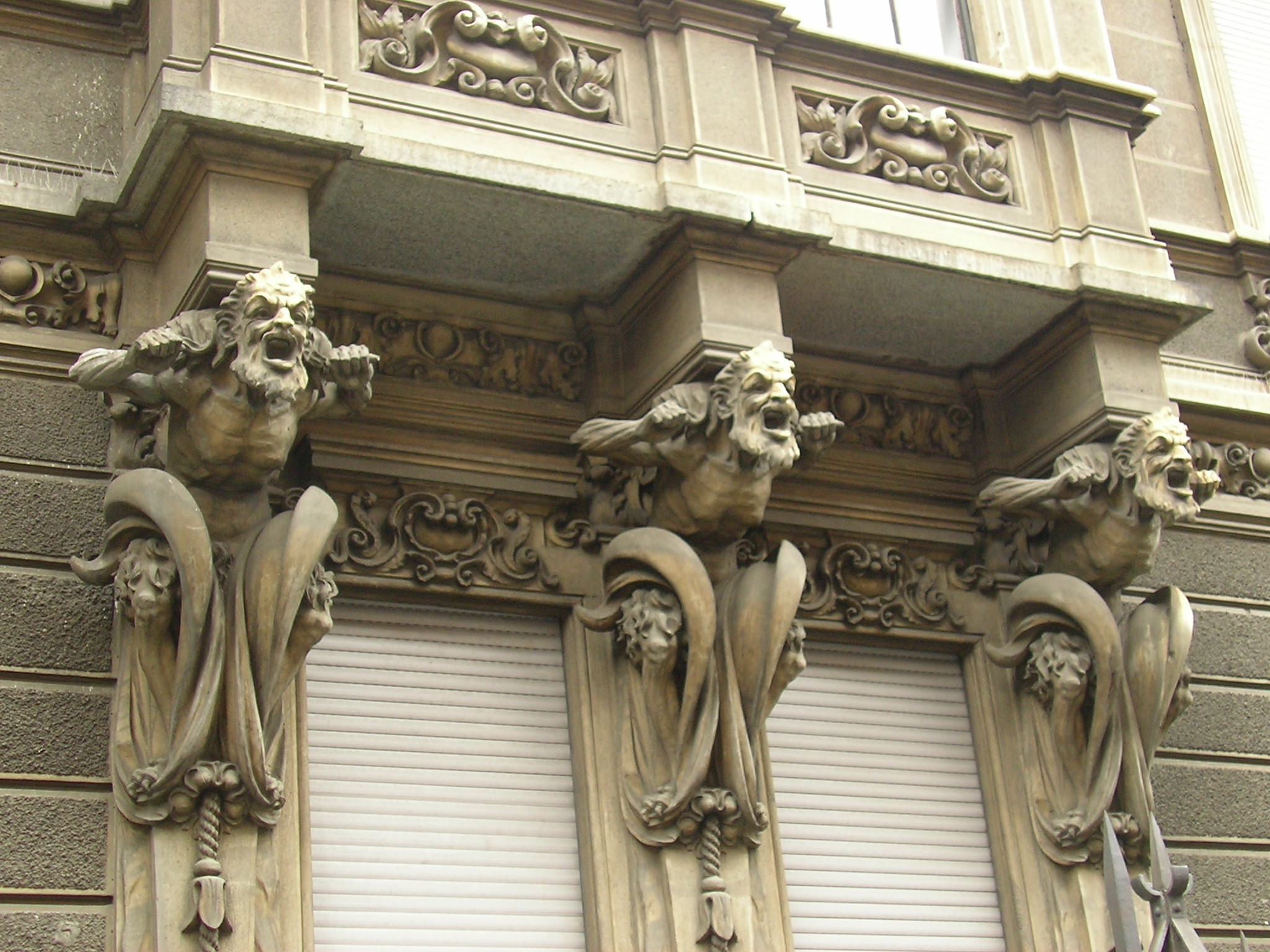 Facciata di abitazione in via Lamarmora